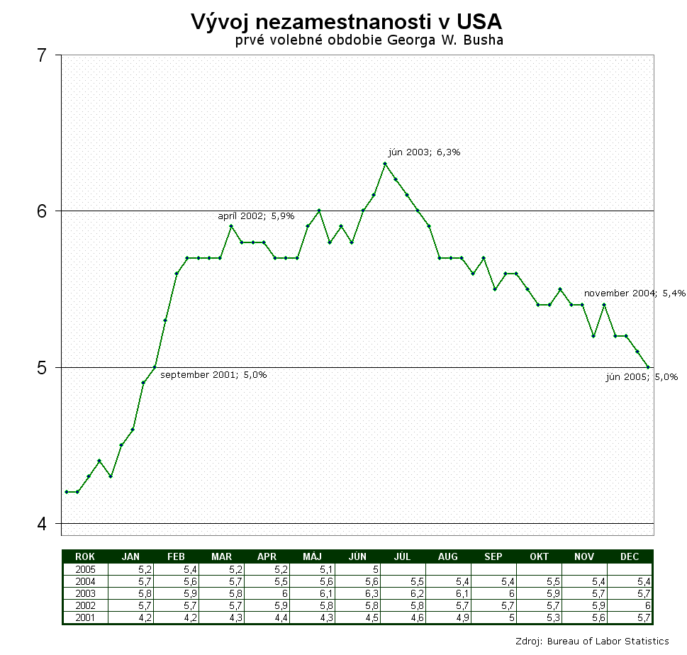 Vyvoj nezamestnanosti v USA pocas prveho volebneho obdobia Georga W. Busha